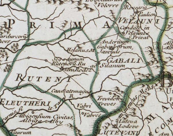 Aubrac :mont hélanus+camino